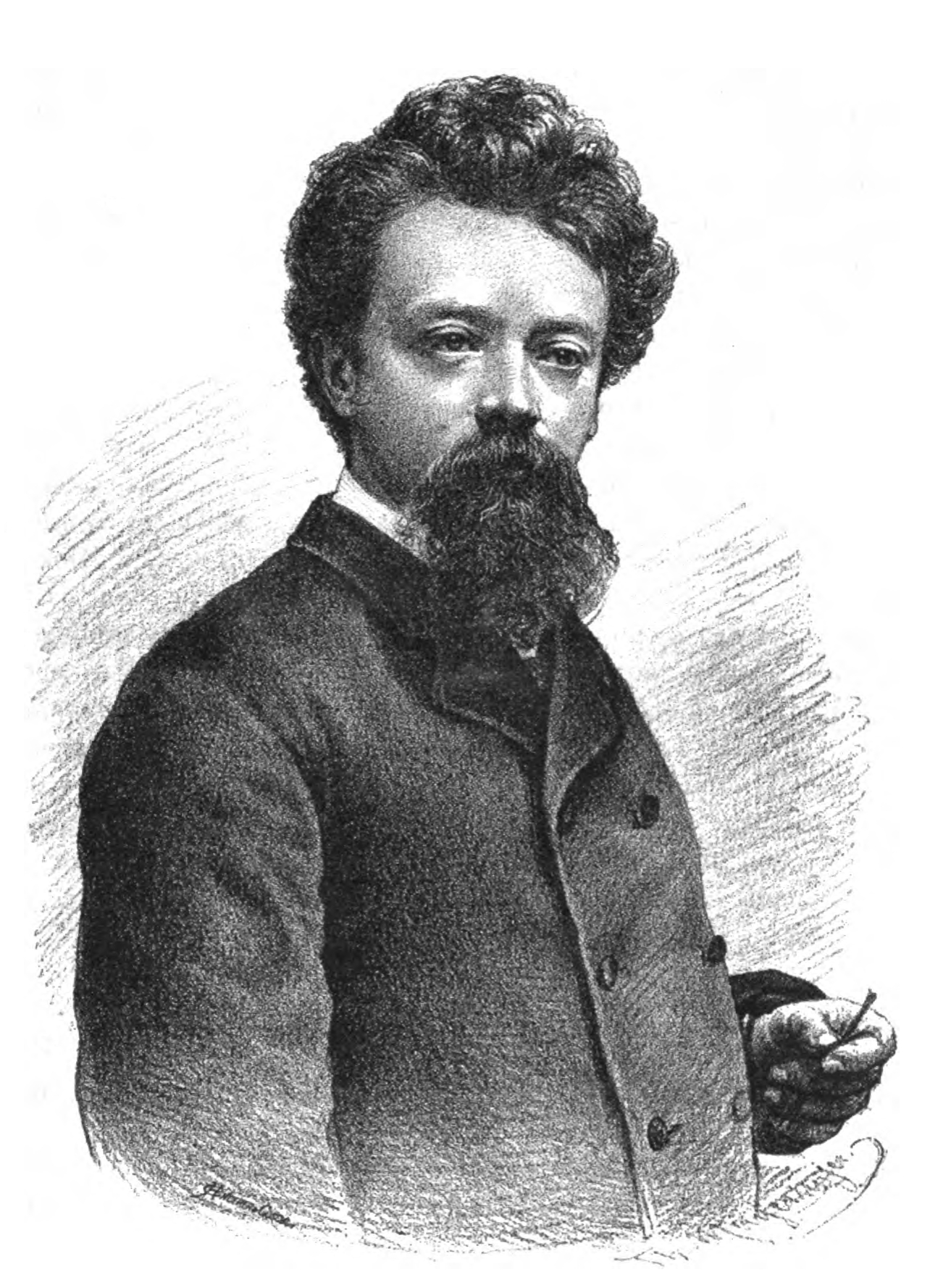 Ivan Rendić (1849–1932), Croatian sculptor